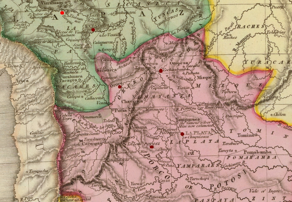 Alto Perú, Detalle de un mapa de las Provincias Unidas en 1812.